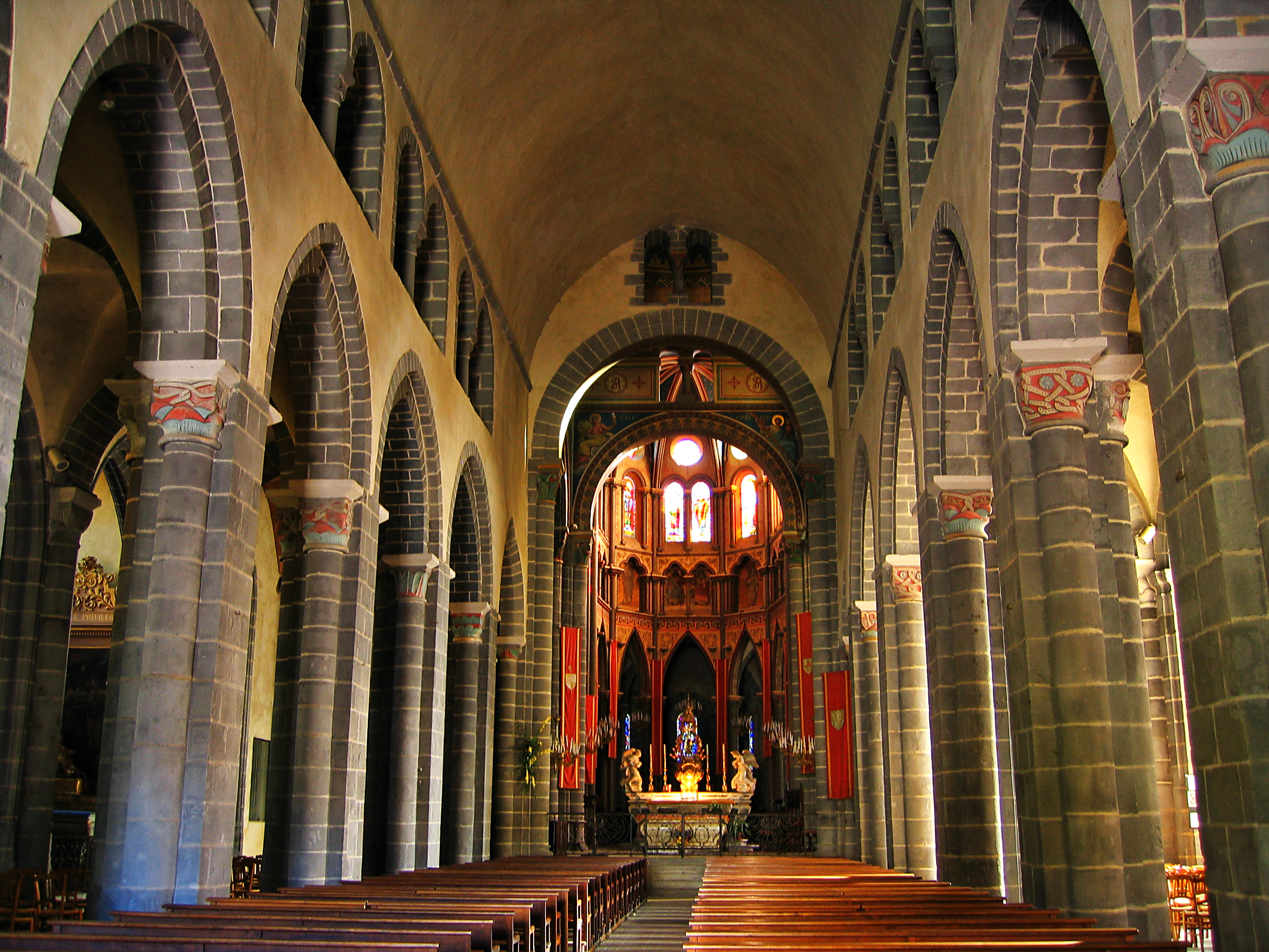 Intérieur de l'église Saint-Amable, commune de Riom, Puy-de-Dôme, région Auvergne. Auteur Jean-Marc Aubelle